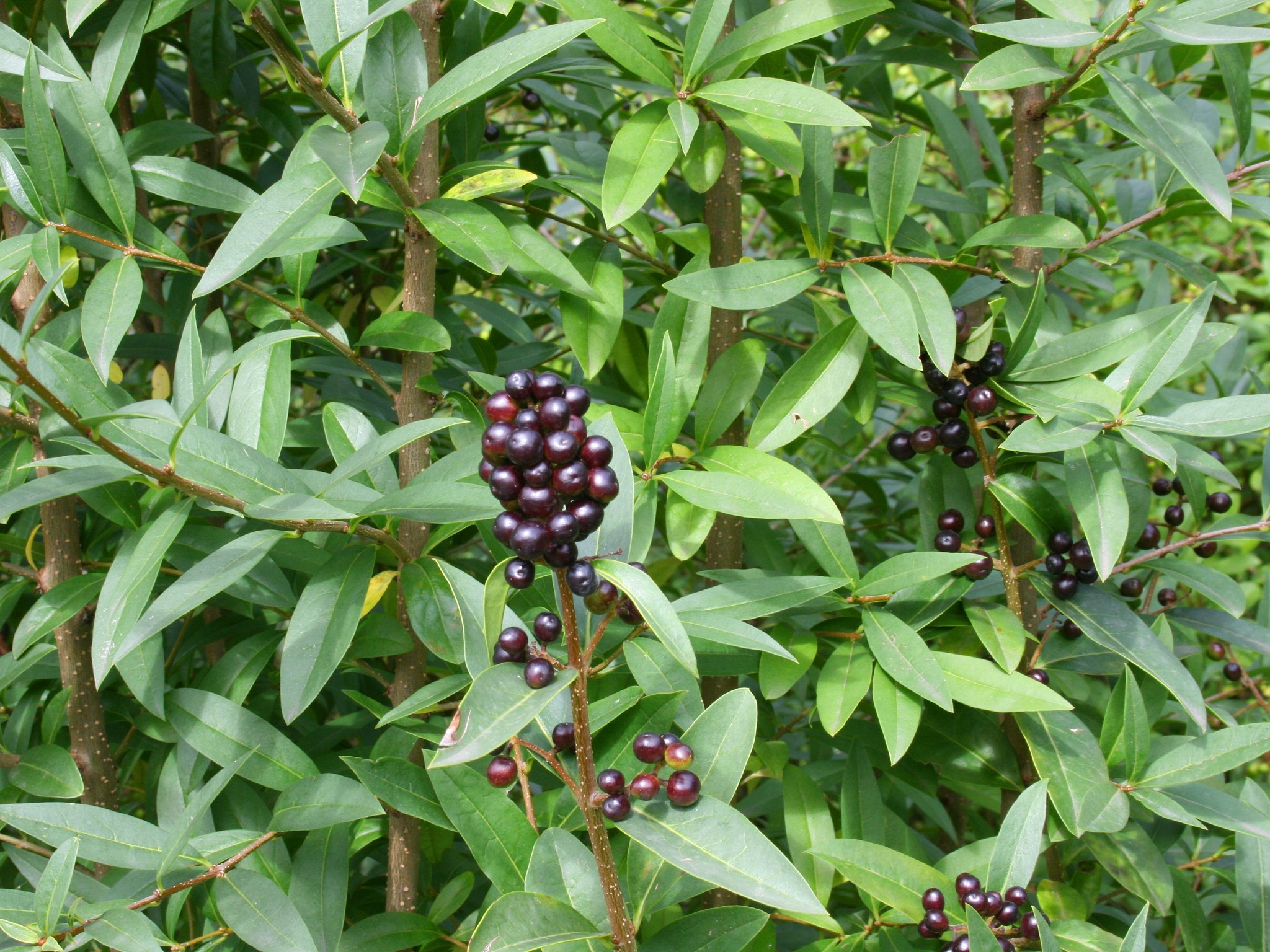 Schurenbachhalde in Essen